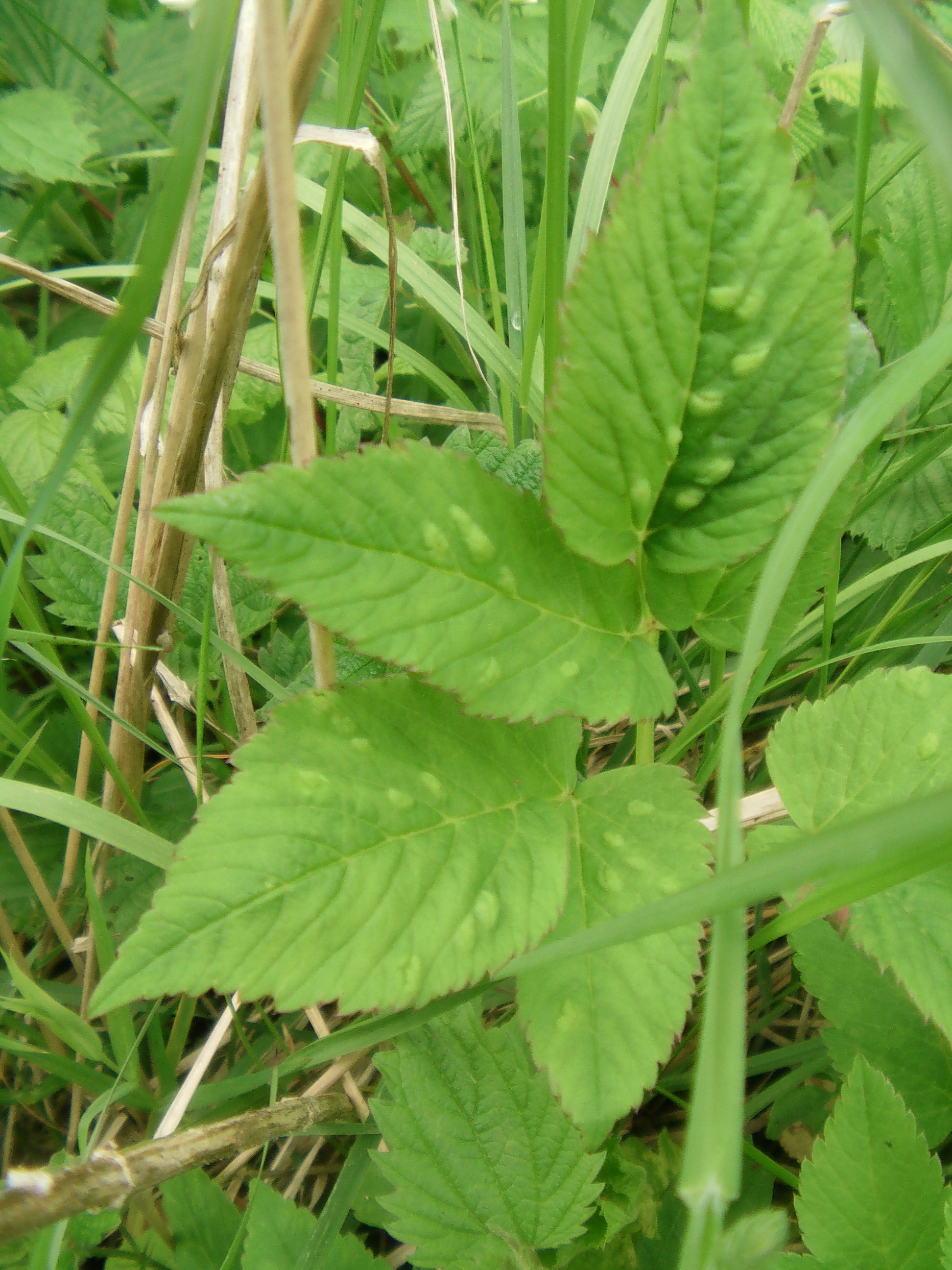 Gallen des Blattflohes Trioza flavipennis(Förster 1848)